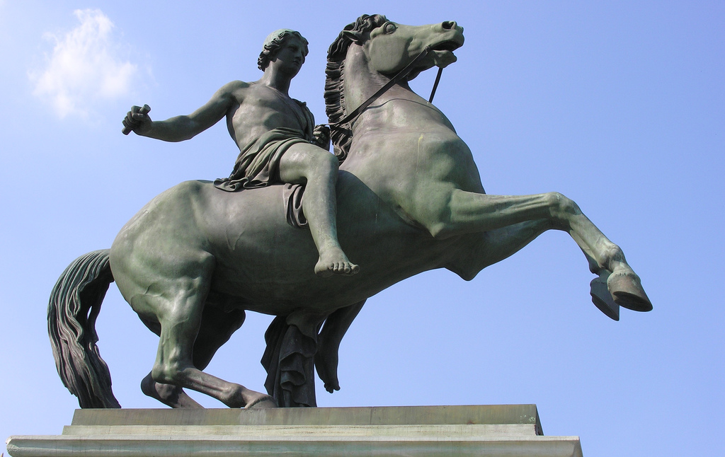 Statua di Castore (Dioscuri), scolpita da Abbondio Sangiorgio, all'ingresso del Palazzo Reale di Torino.